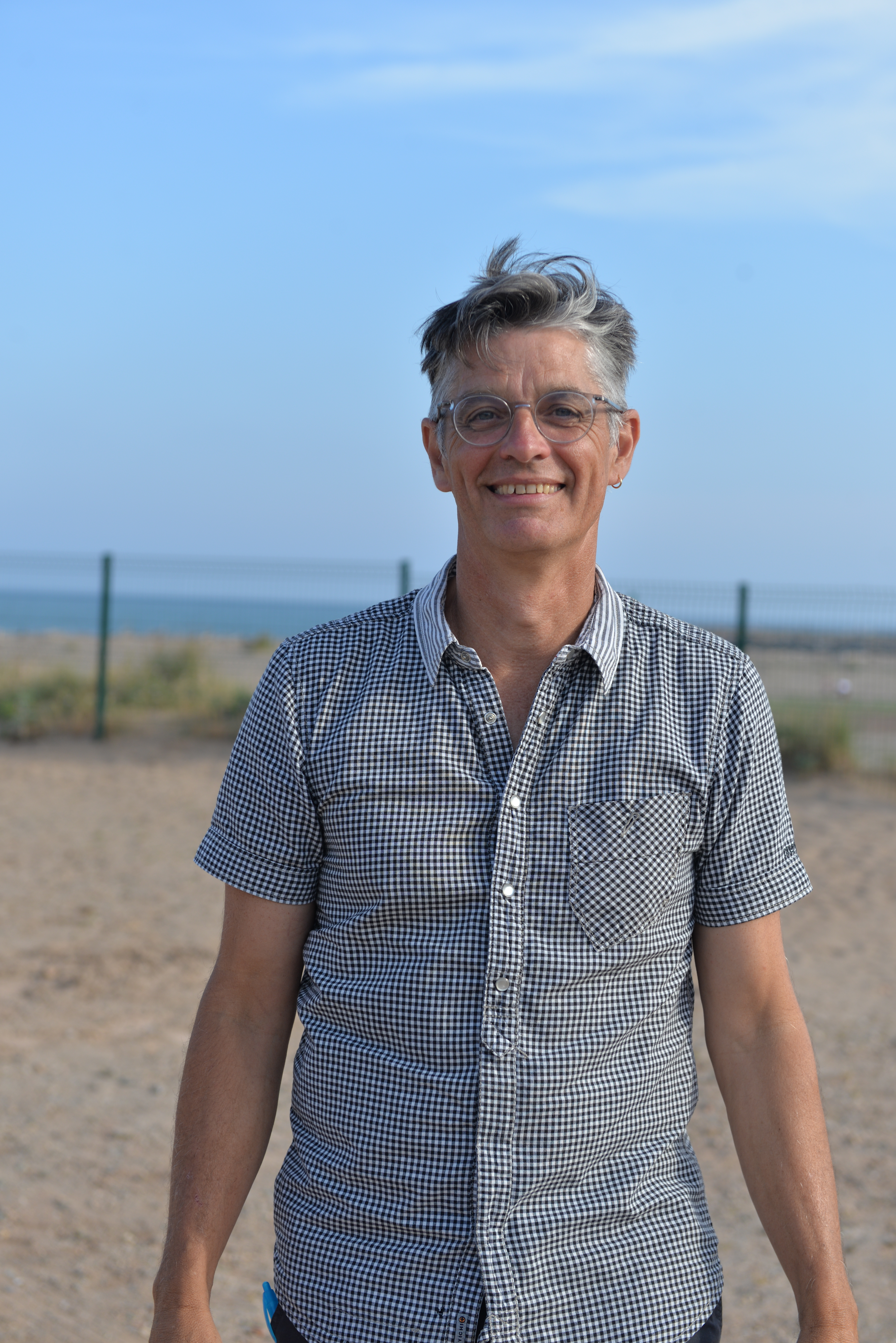 Patrick Saint-Léger, nouveau secrétaire général du Syndicat National de l'Environnement (SNE) lors du congrès de Sérignan (34) en mai 2017